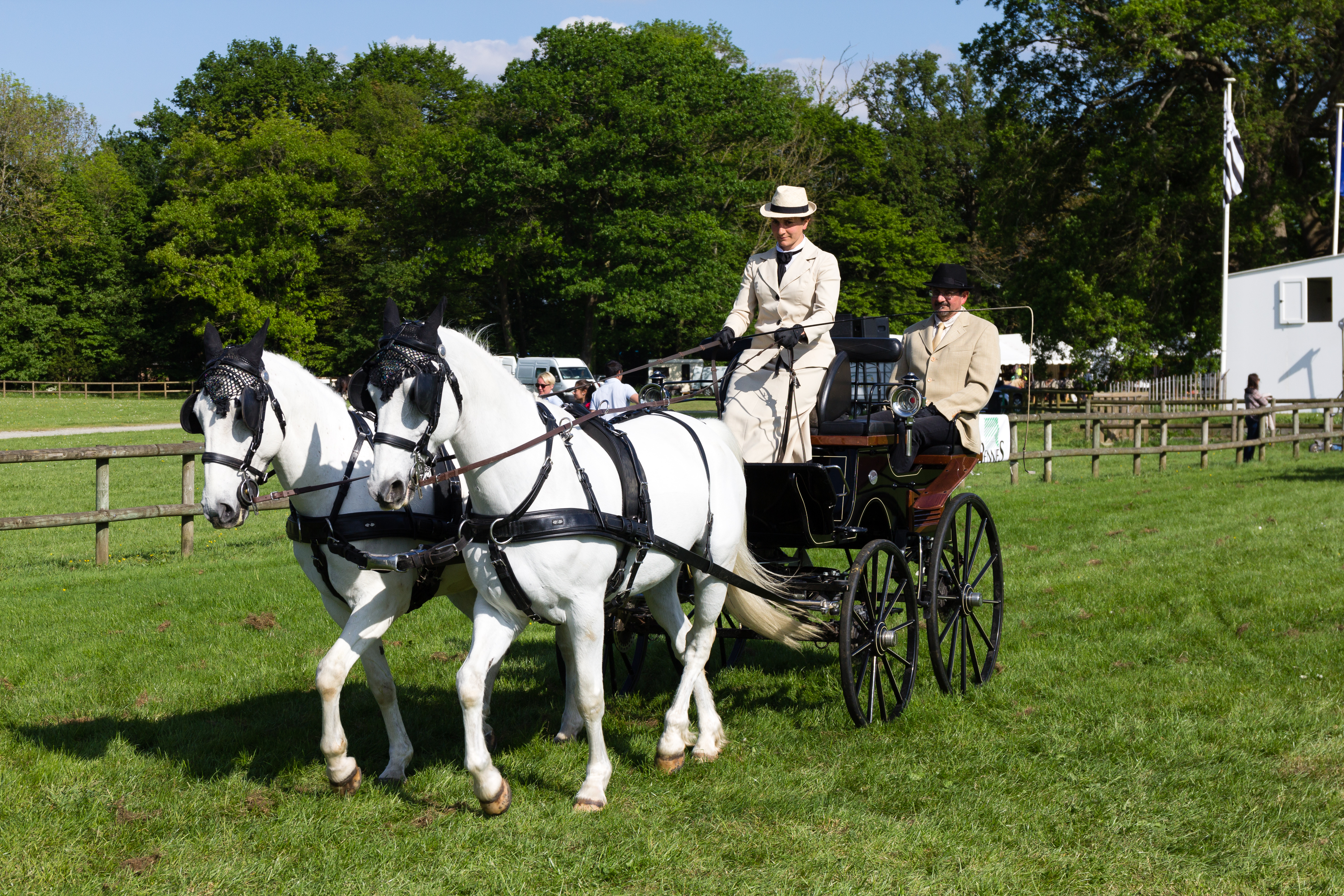 Édition 2016 du concours national d'attelage Élite de Rennes.